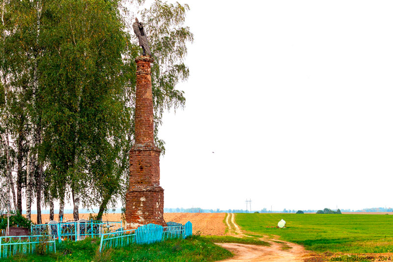 Фашчаўка. Мемарыяльная калонаБеларуская (тарашкевіца): Фашчаўка. Мэмарыяльная калёна